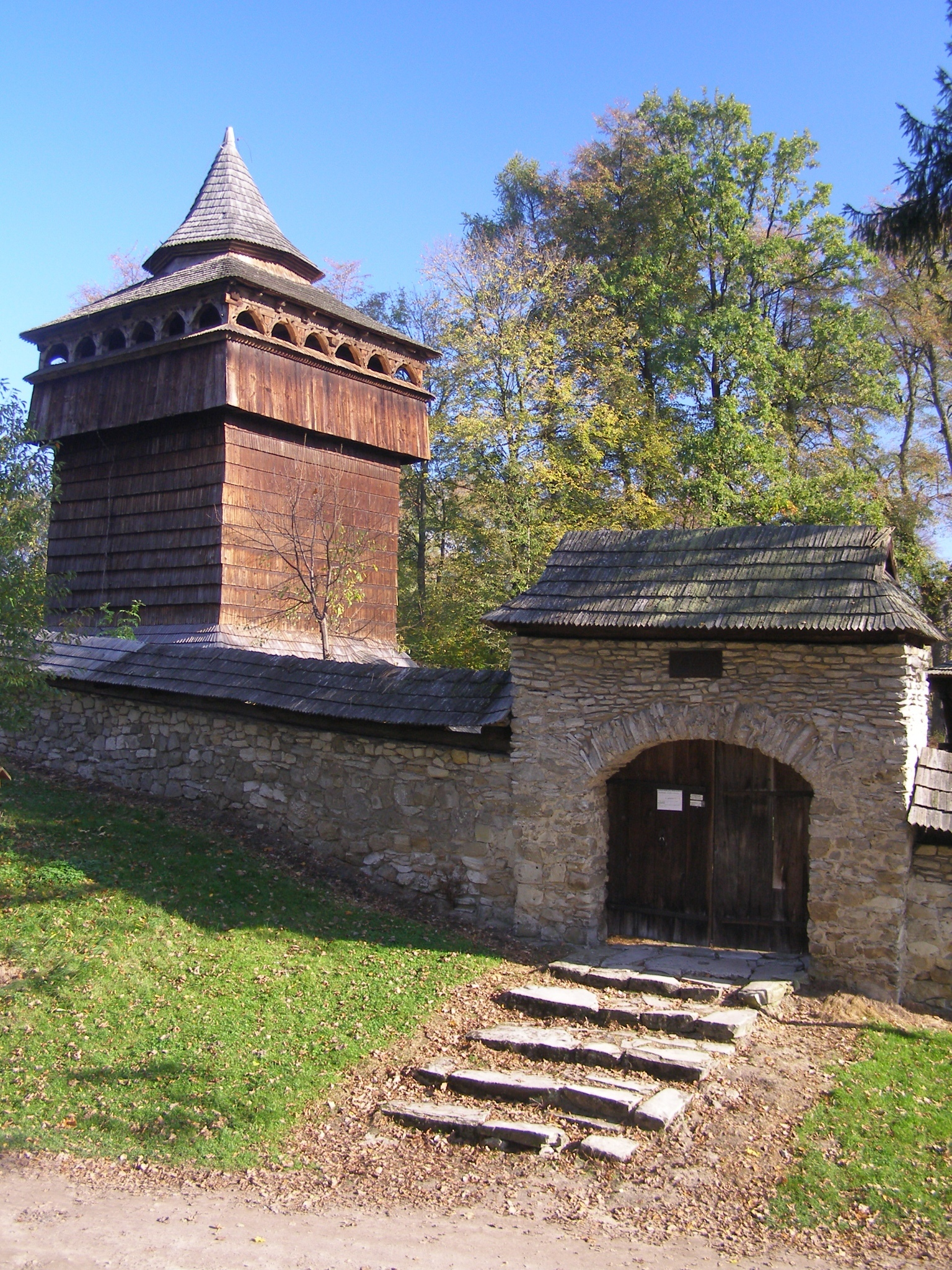 wieś Radruż